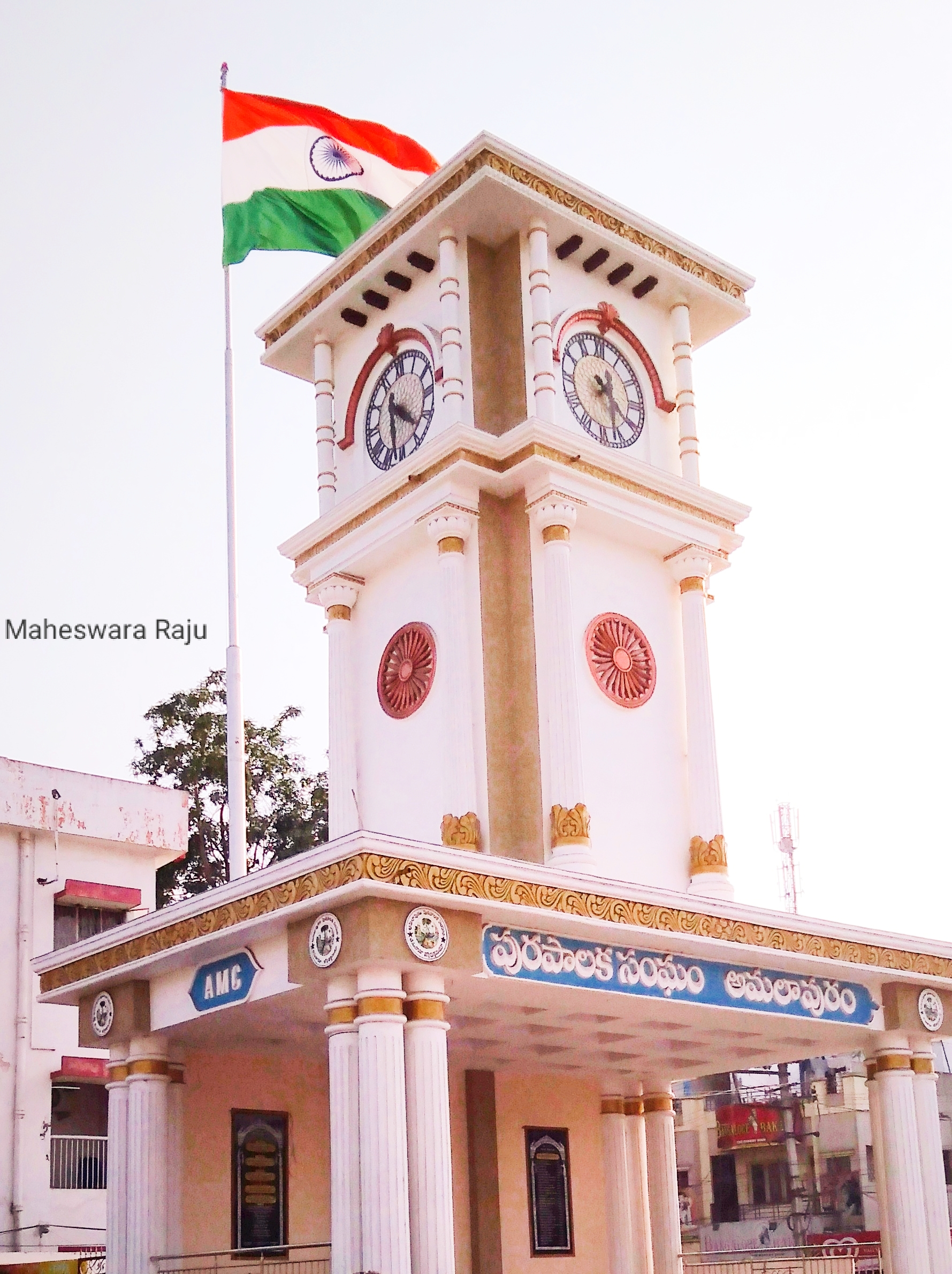 అమలాపురంలో నూతన గడియర స్తంభం